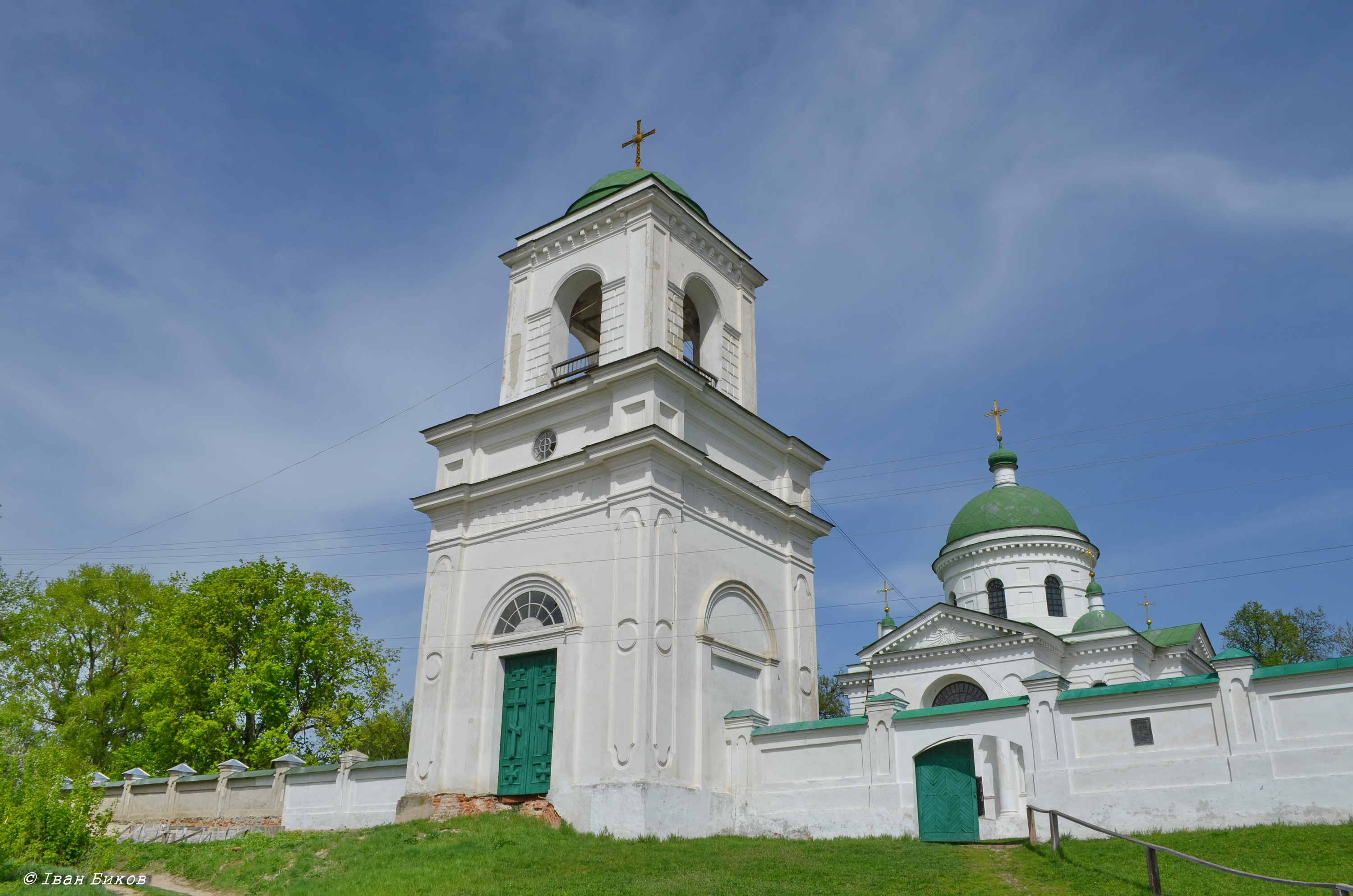 Комплекс Михайлівської церкви (мур.), с.Петрівське